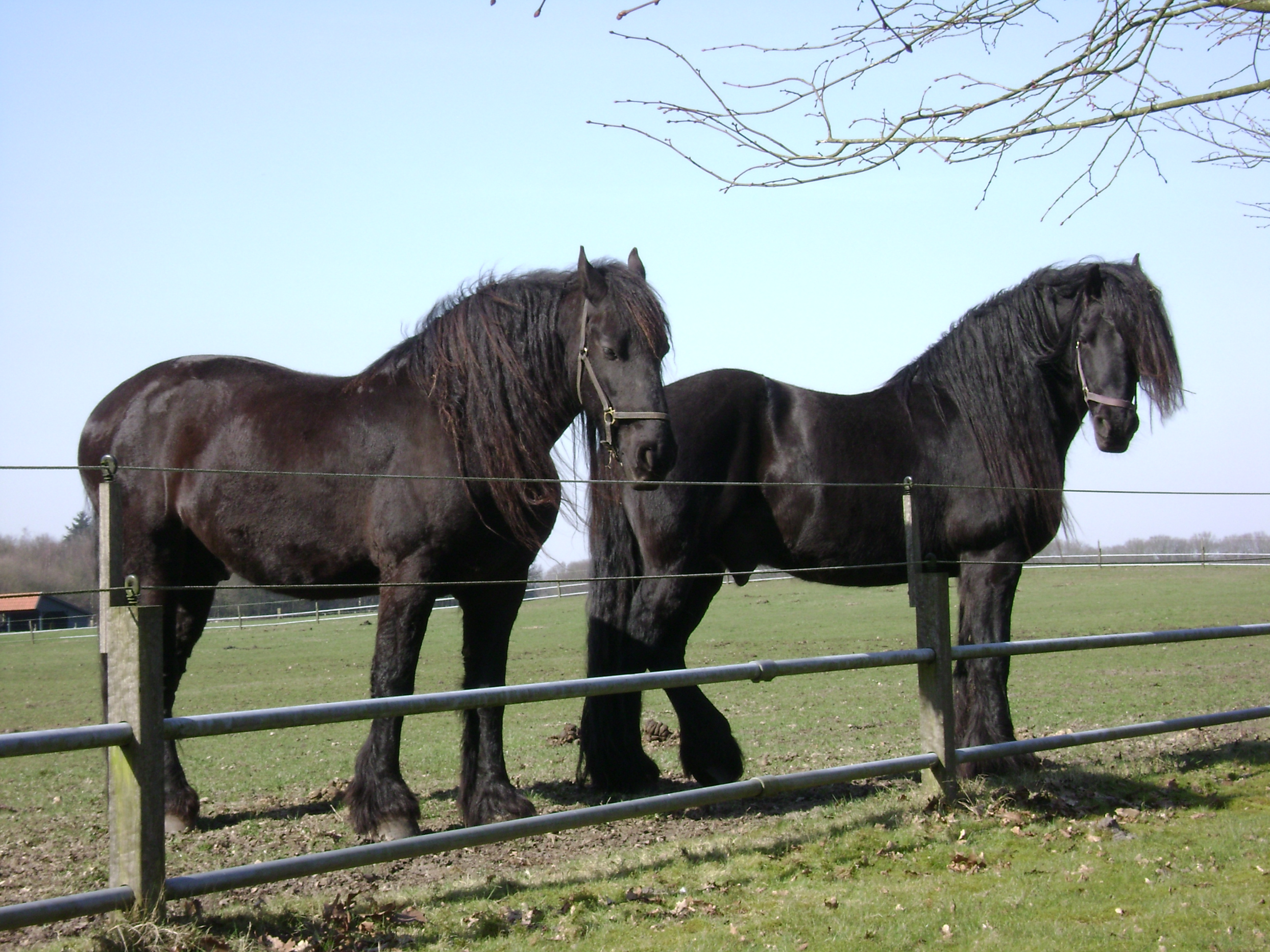 Friesian horse